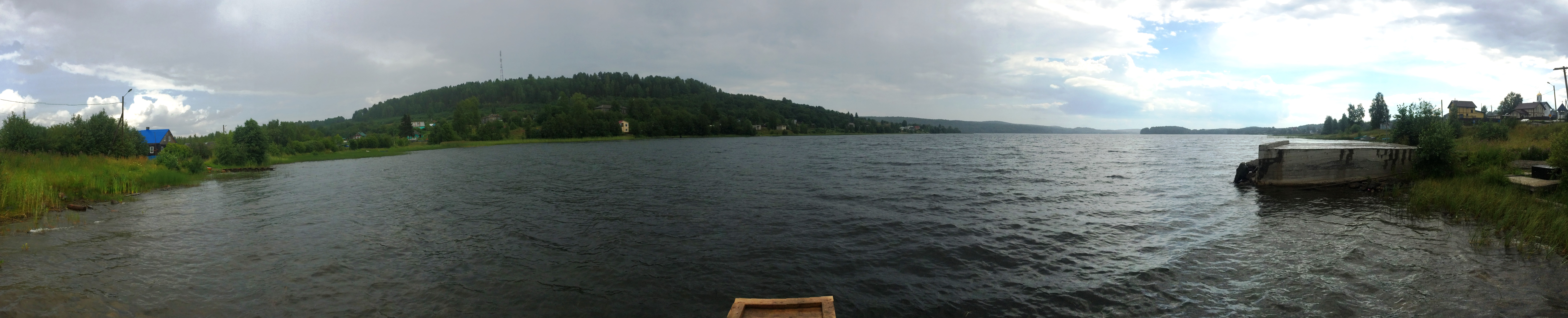 Мунозеро (озеро, Карелия)